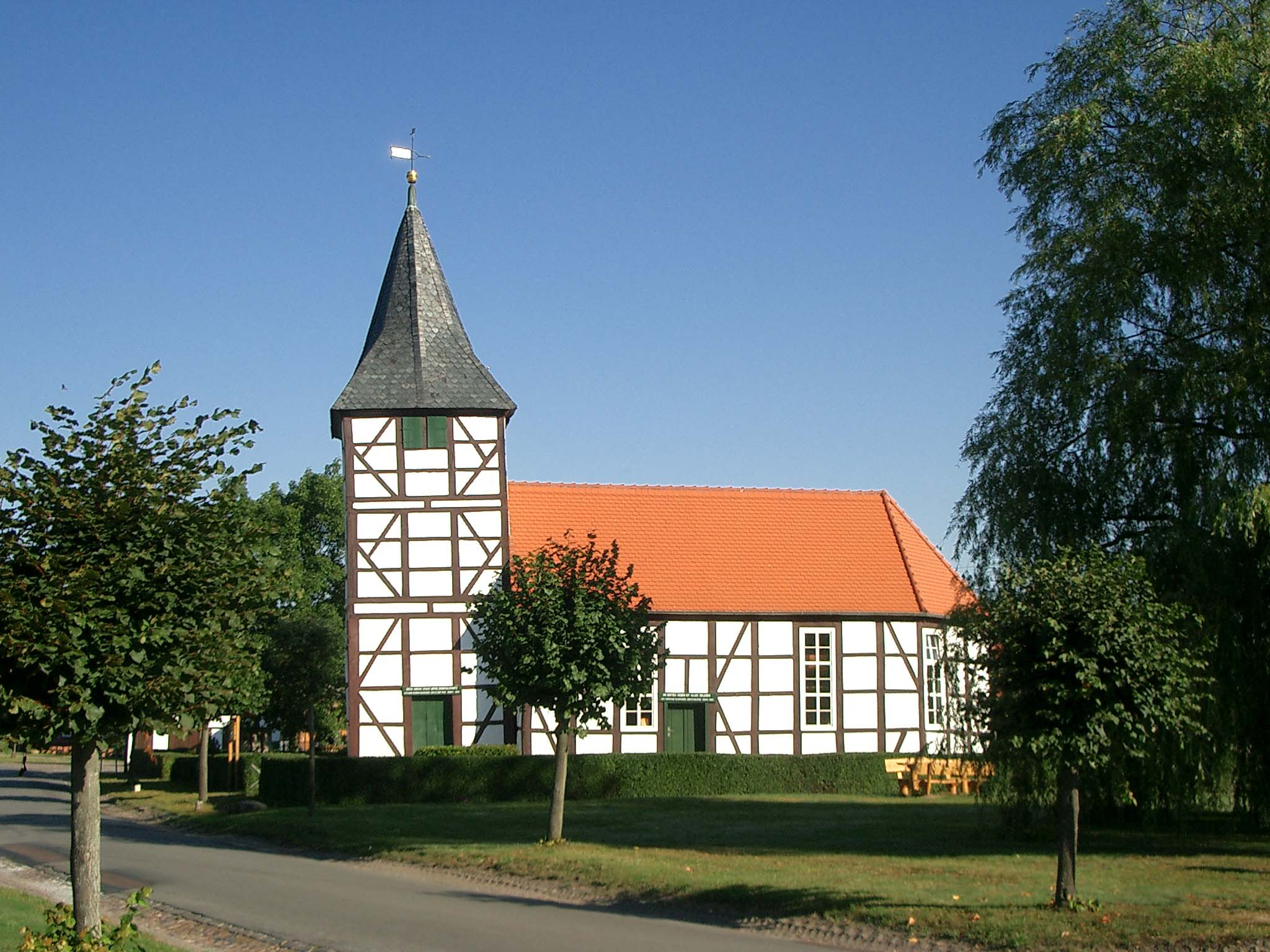 Dorfkirche in Wenze